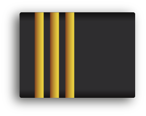 Rangen van de Nederlandse politie, epauletten (schuifpassanten) t.b.v. het huidige en het nieuwe (na 2014) uniform.